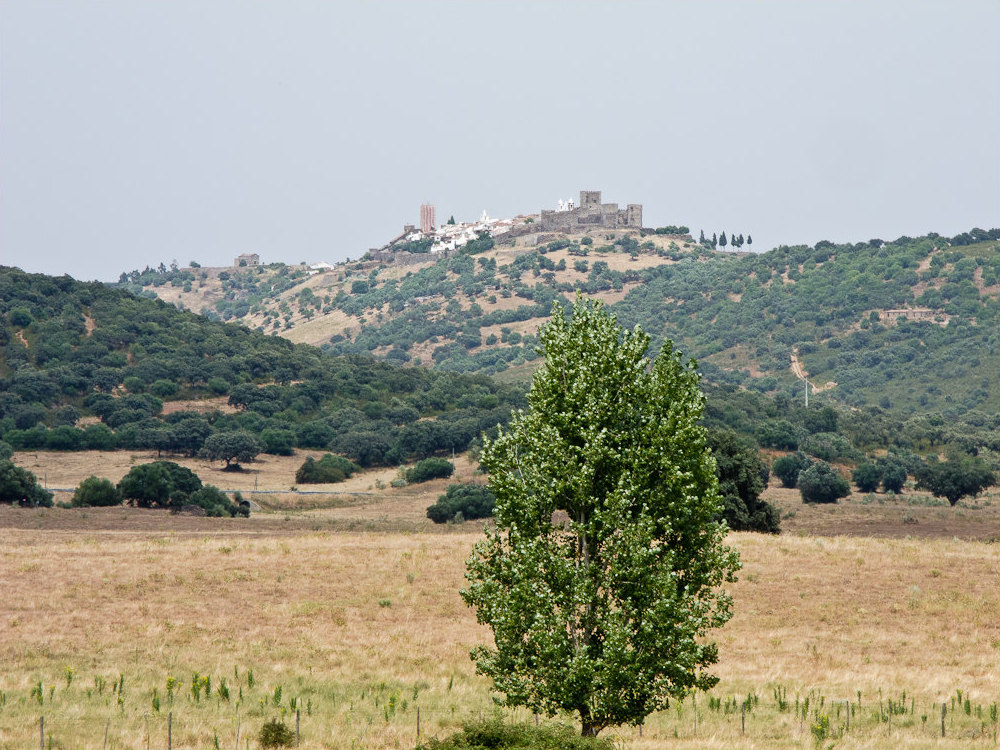 Portugal